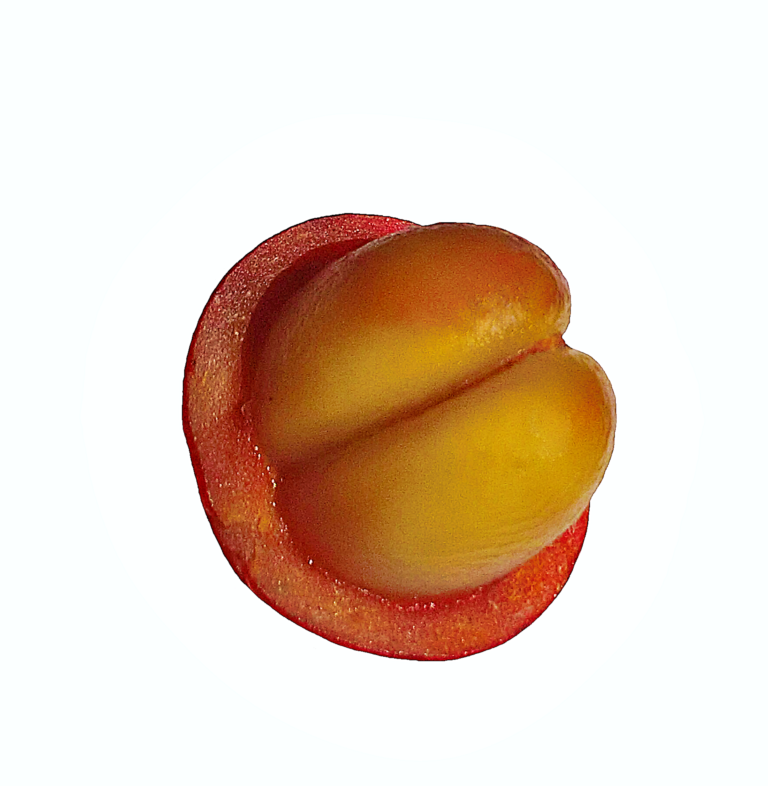 Drupe de caféier coupée de façon à voir ses organes (le mésocarpe et la couche qui recouvre l'endocarpe))